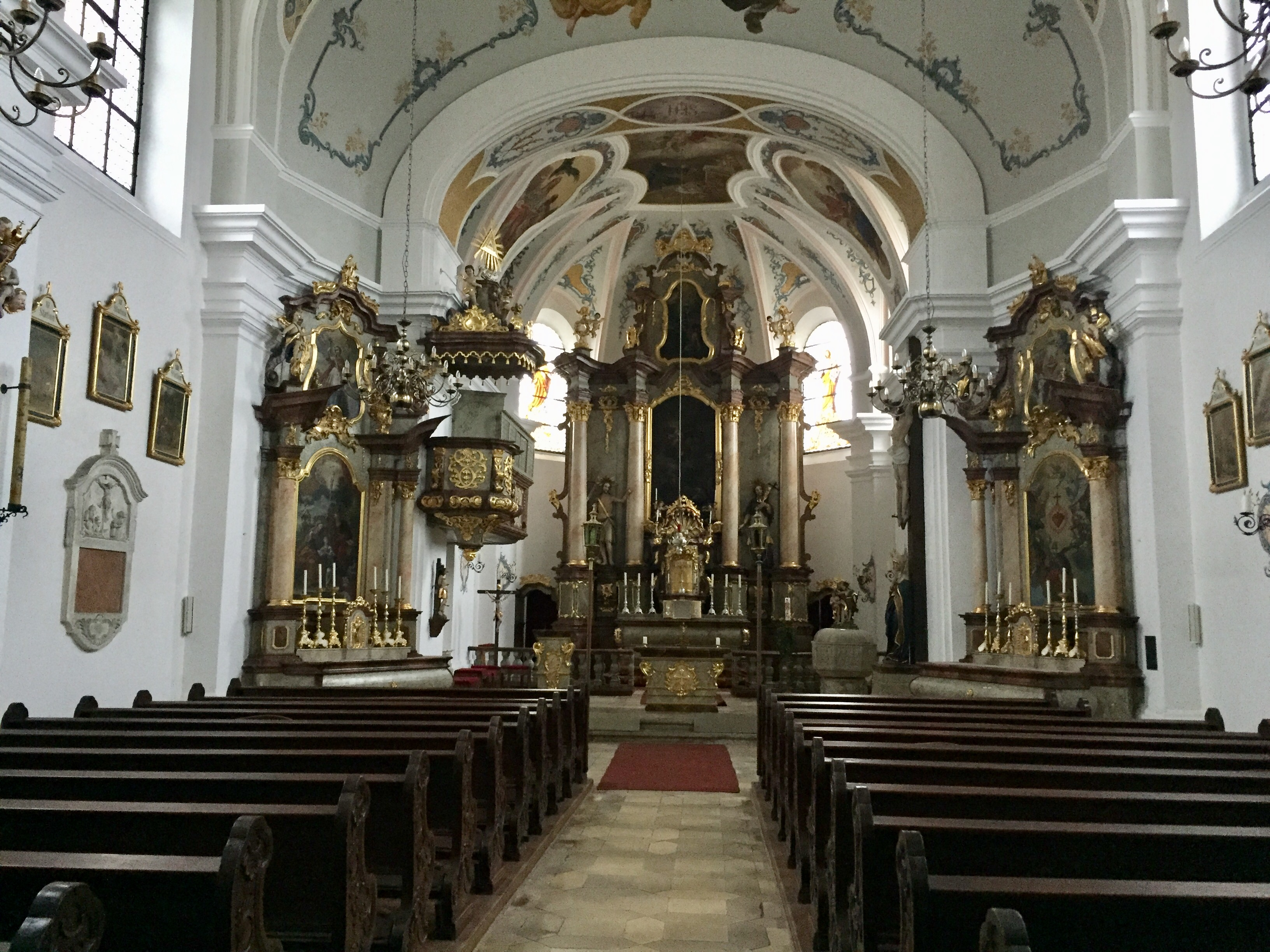 Innenansicht zum Altar